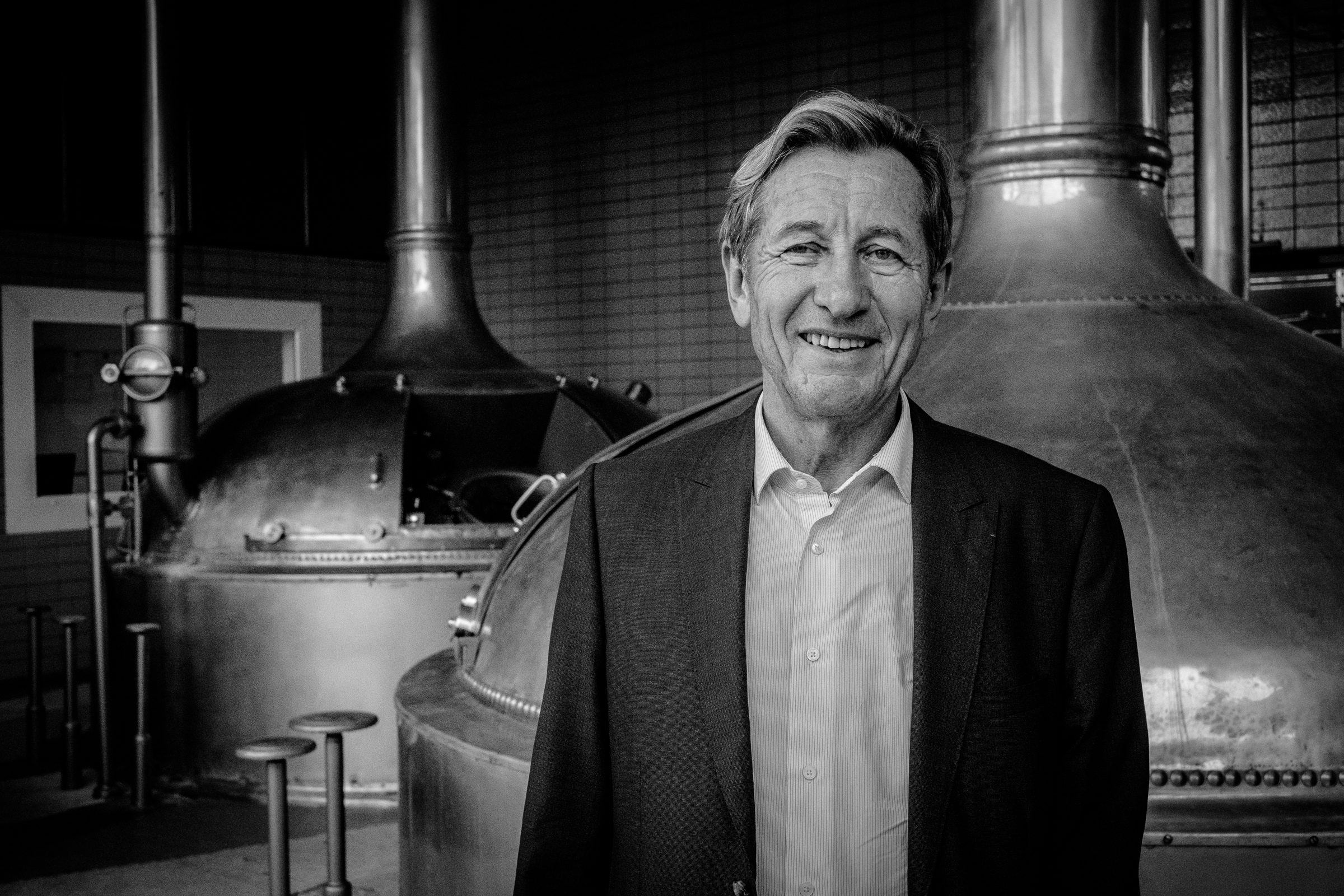 Michel Haag par Claude Truong-Ngoc